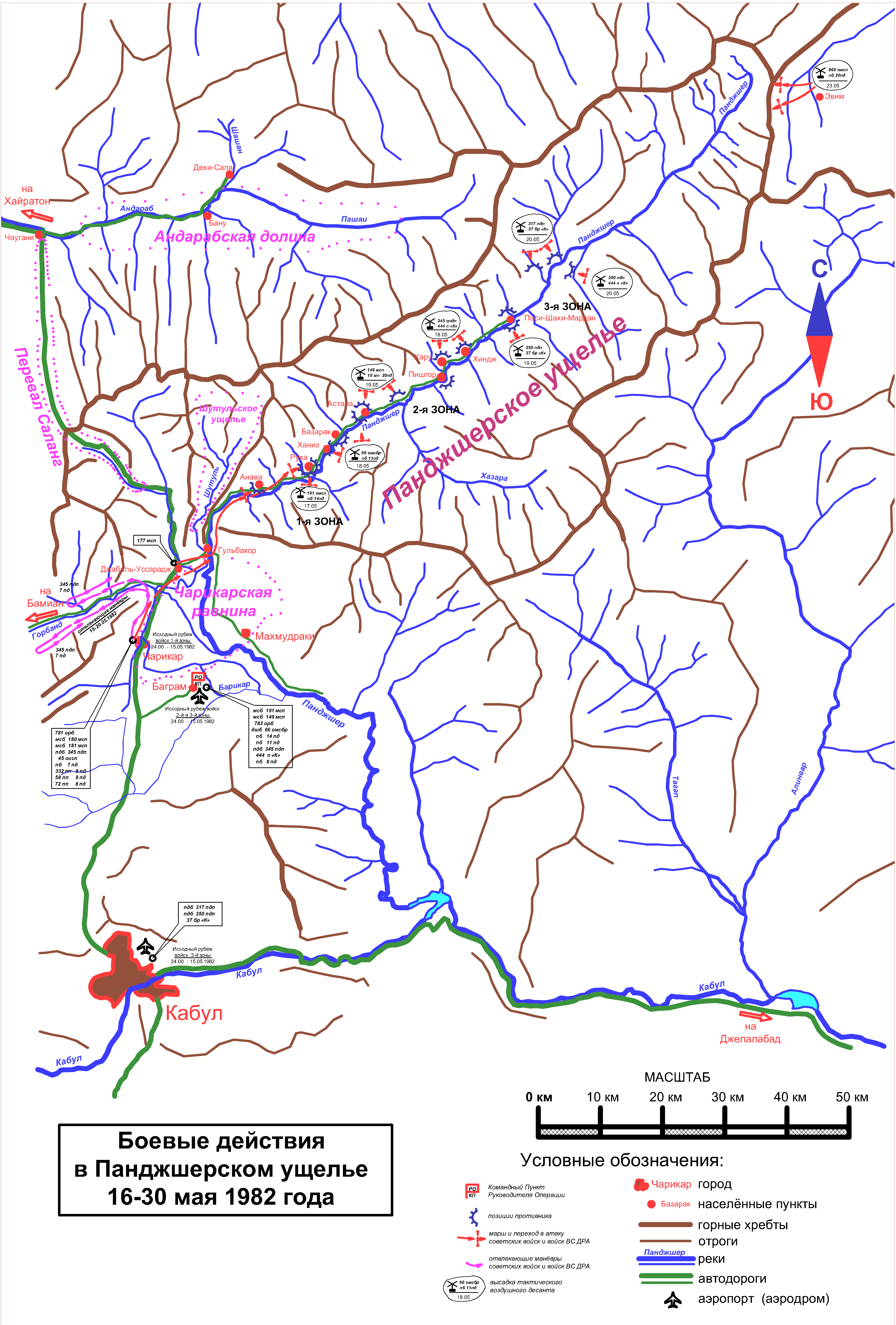 Боевые действия в Панджшерском ущелье 9-12 апреля 1980 года. Собственная работа. Отчерчено в AutoCAD.